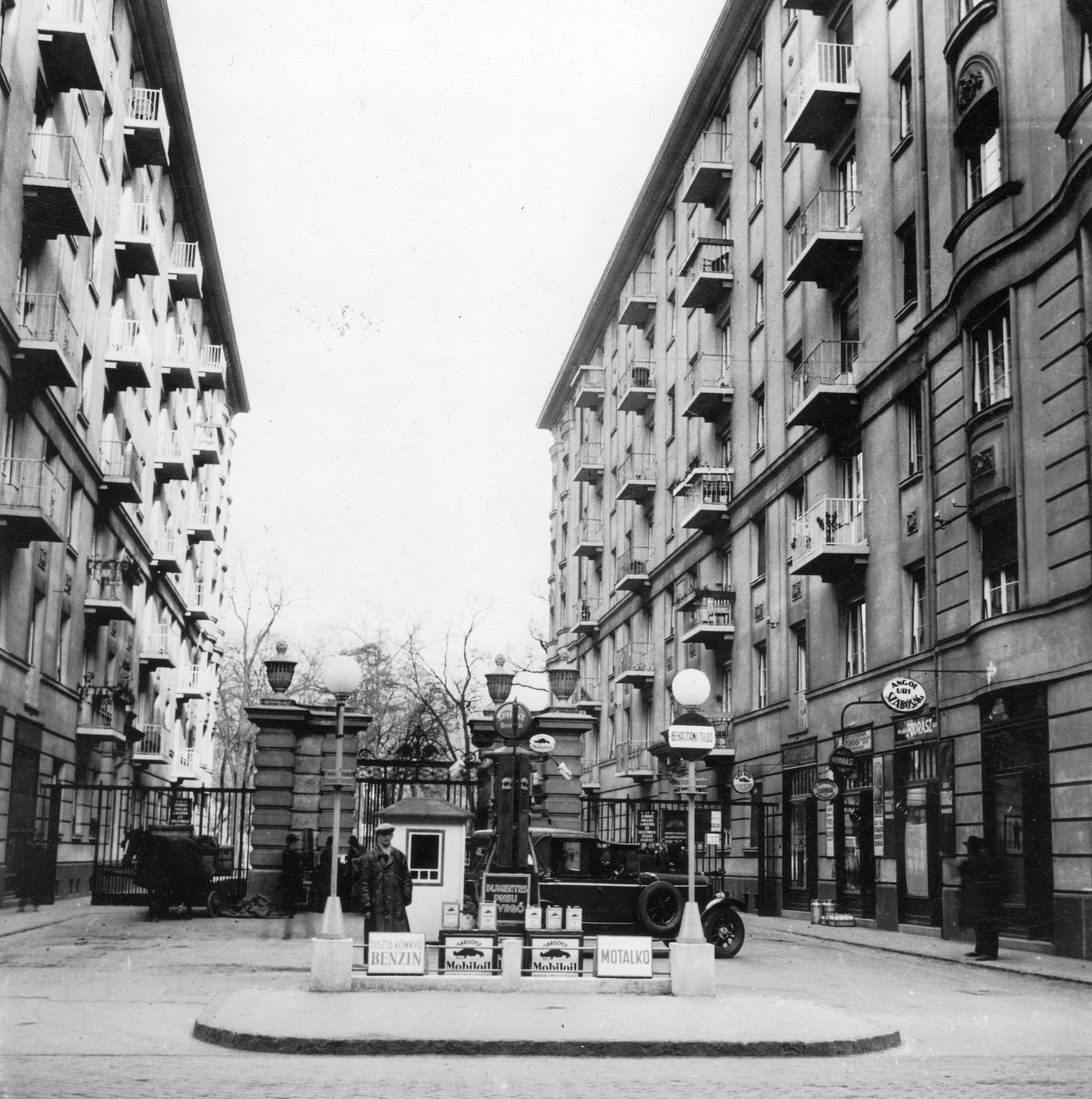 Damjanich utca 40. és 42. közötti benzinkút. Forrás: National Archives (USA) Location: Hungary, Budapest VII. Tags: gas station, automobile, Budapest Title: Damjanich utca 40. és 42. közötti benzinkút. Forrás: National Archives (USA)